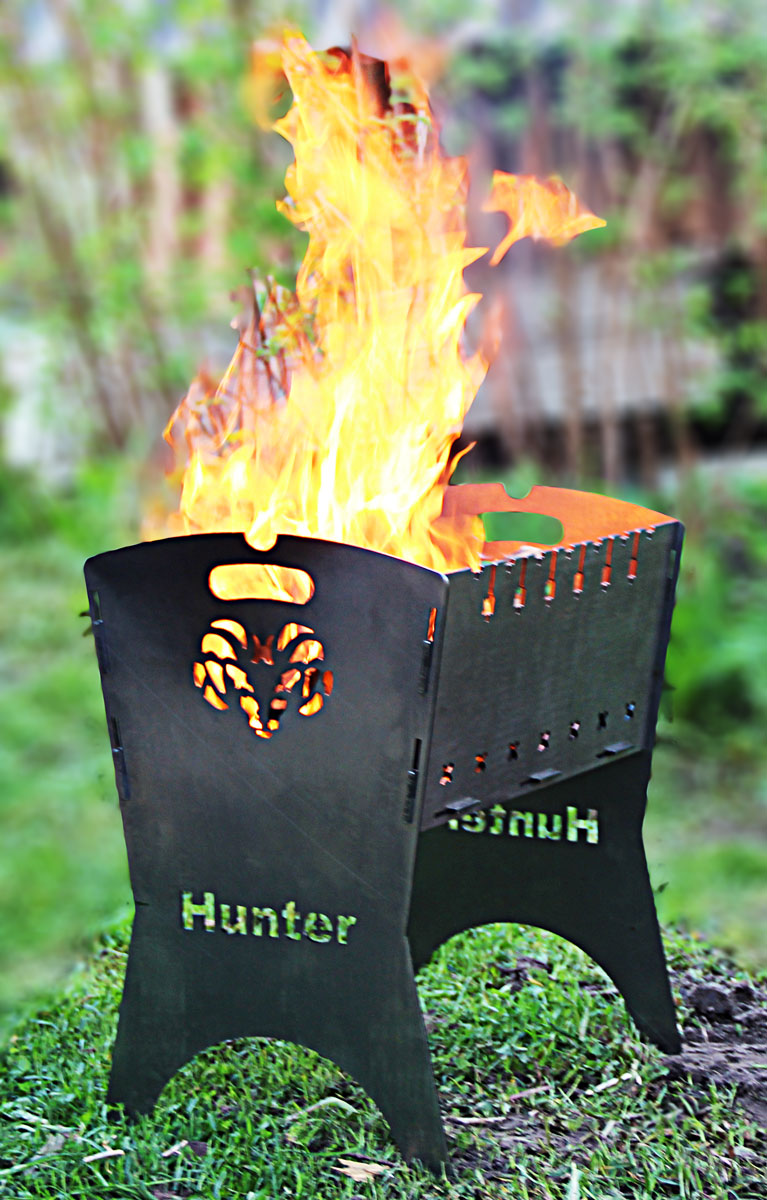 На фотографии изображен разборный мангал для приготовления шашлыка на природе.